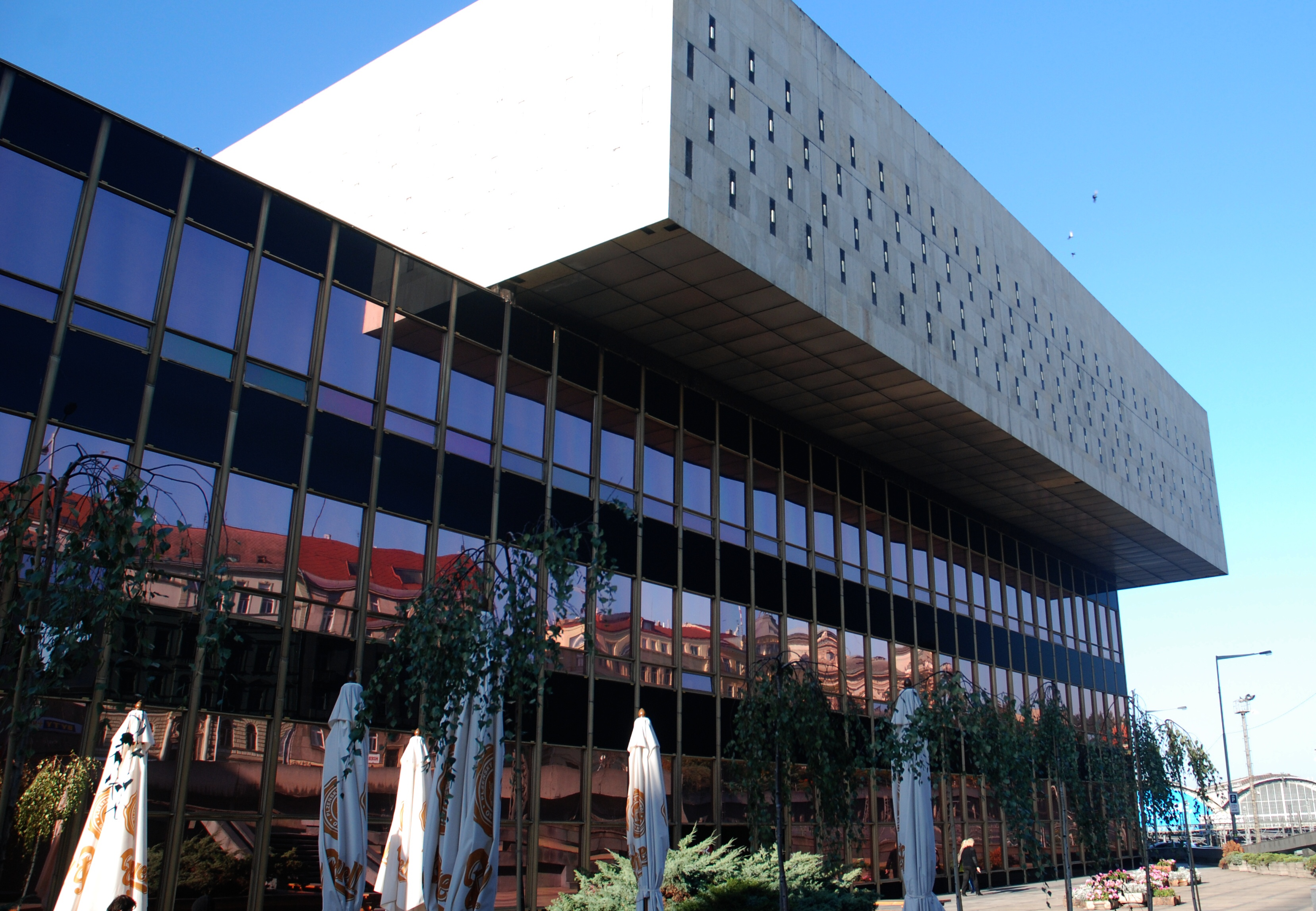 Budová federálního shromáždění od Legerovy ulice